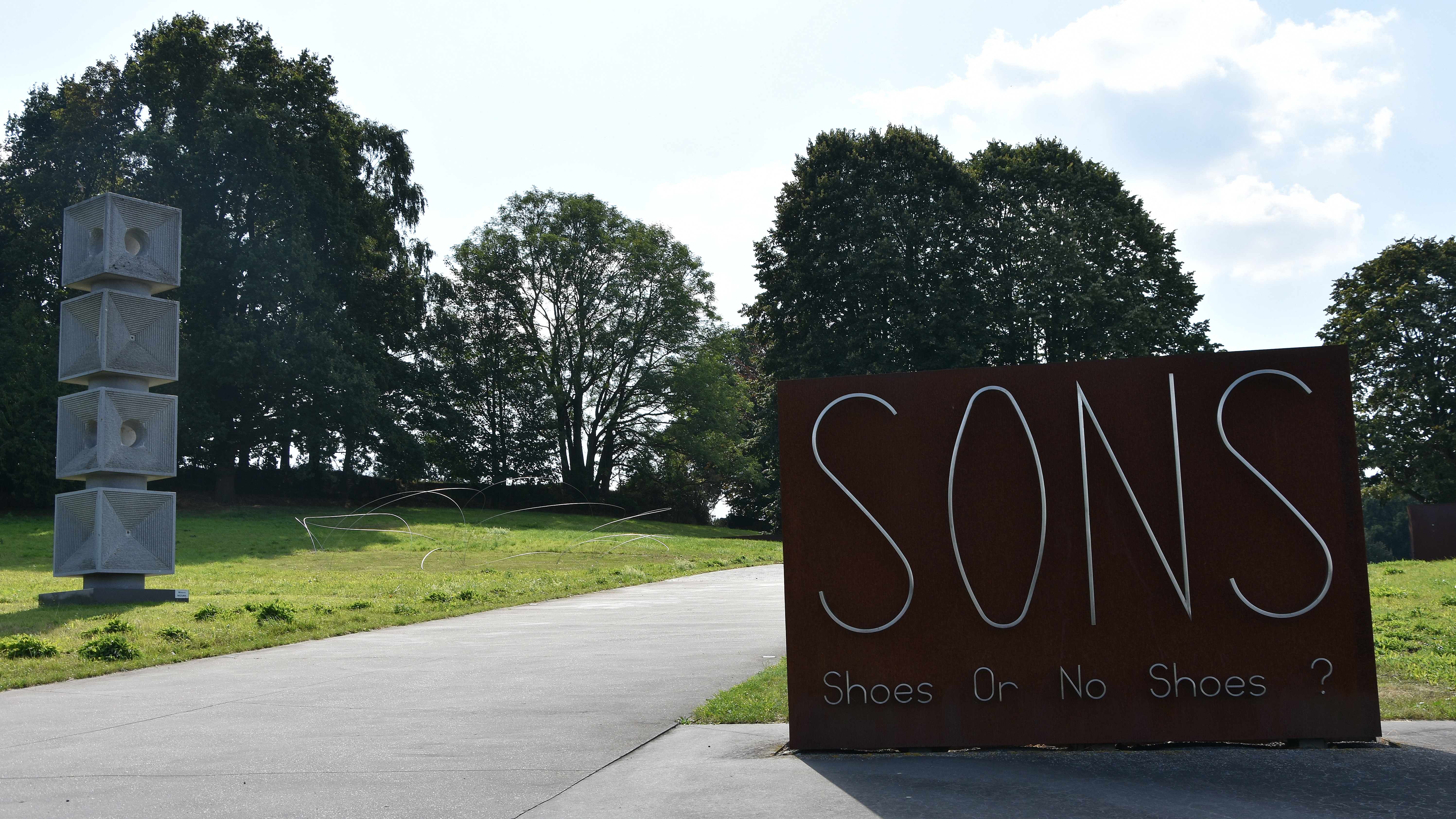 SONS Kruishoutem 10-09-2019 13-47-042 This photo of immovable heritage has been taken in the Flemish Region